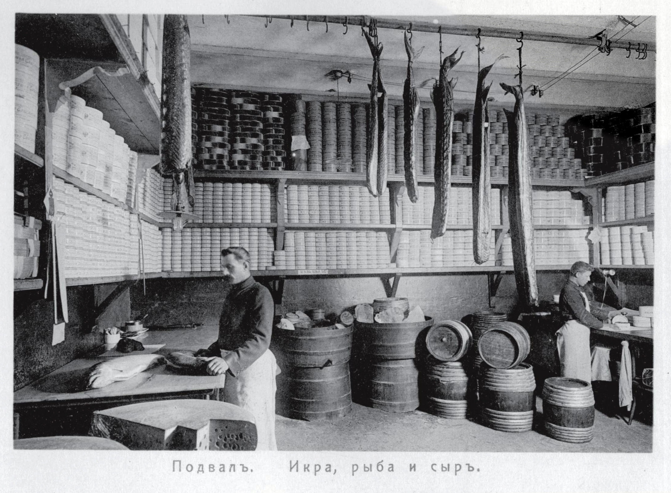 Магазин Елисеева и погреба русских и иностранных вин. Подвал